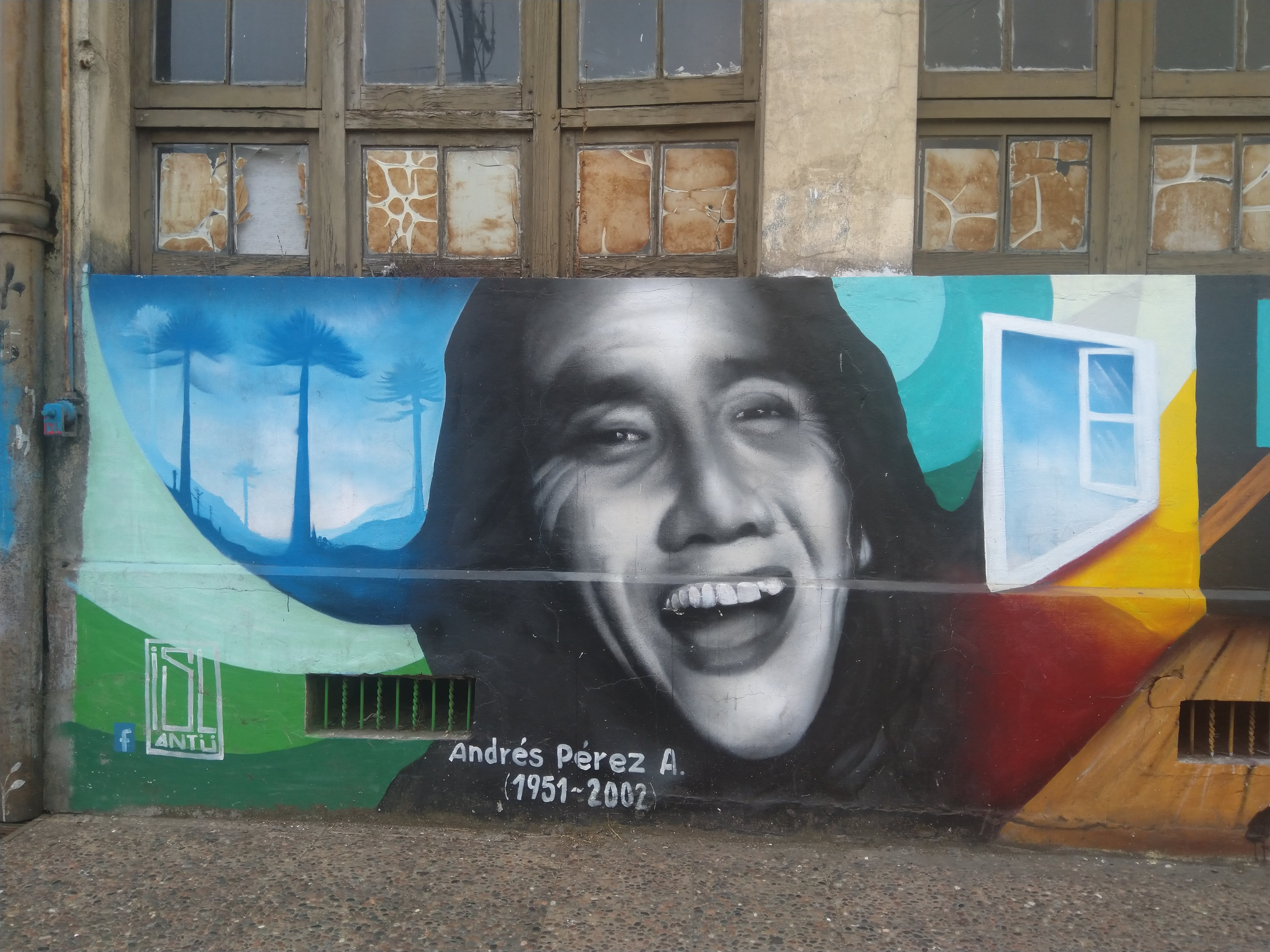 Grafiti con el rostro de Andrés Pérez en la ciudad de Temuco, Región de la Araucania, Chile. Andrés Lorenzo Pérez Araya (Punta Arenas, 11 de mayo de 1951-Santiago, 3 de enero de 2002) fue un actor, dramaturgo y director teatral chileno, conocido principalmente por la obra La negra Ester y su labor en el teatro callejero.